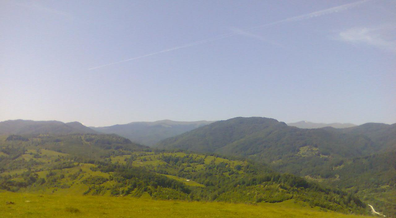 Regiune deluroasa